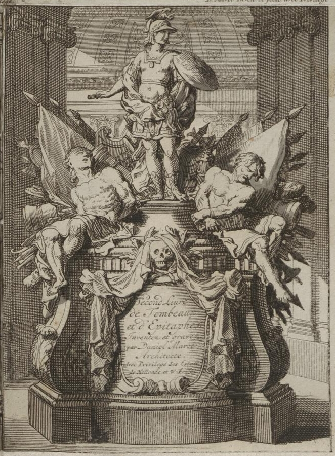 Grafik aus dem Klebeband Nr. 16 („Leichbegängnisse“) der Fürstlich Waldeckschen Hofbibliothek Arolsen Motiv: Entwurf für ein Epitaph